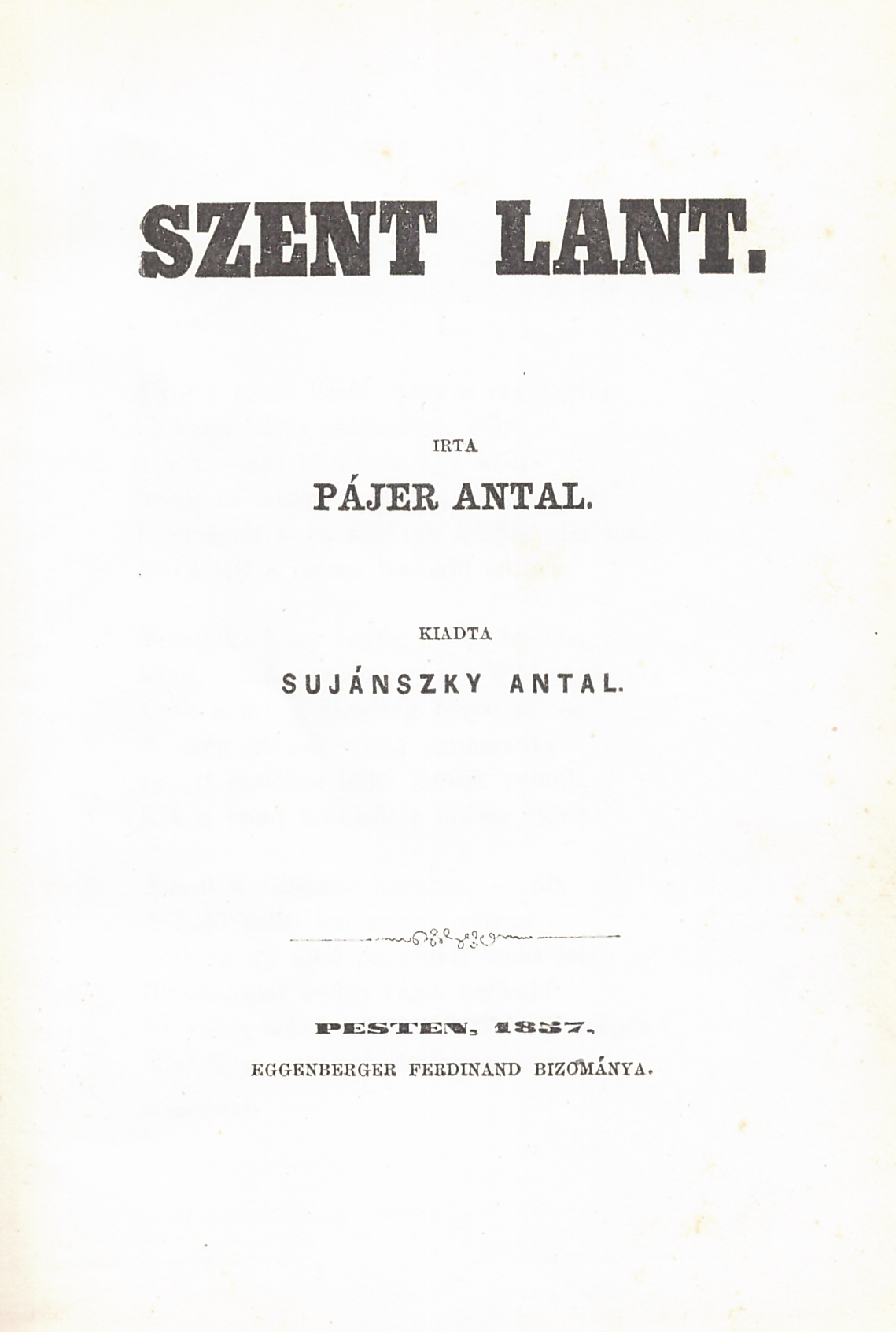 Pájer Antal (1817-1881): Szent lant (1857)